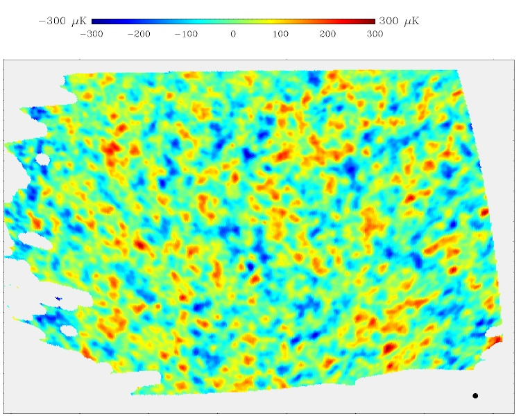 Boomerang CMB